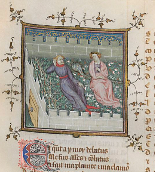 Iluminura Guillaume de Machaut et Bon Espoir de Le Remède de Fortune nas obras completas de Guillaume de Machaut